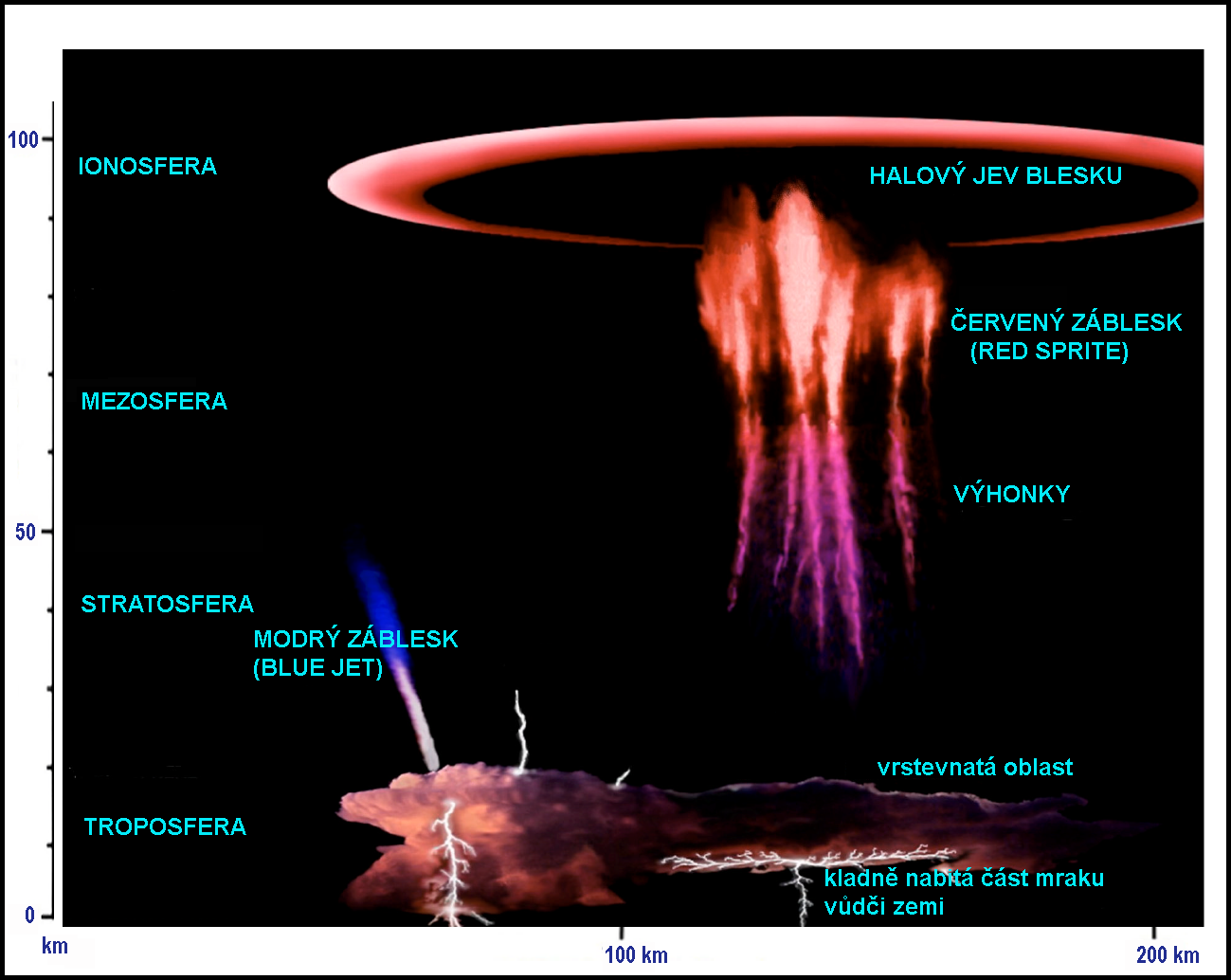 Troposférický blesk